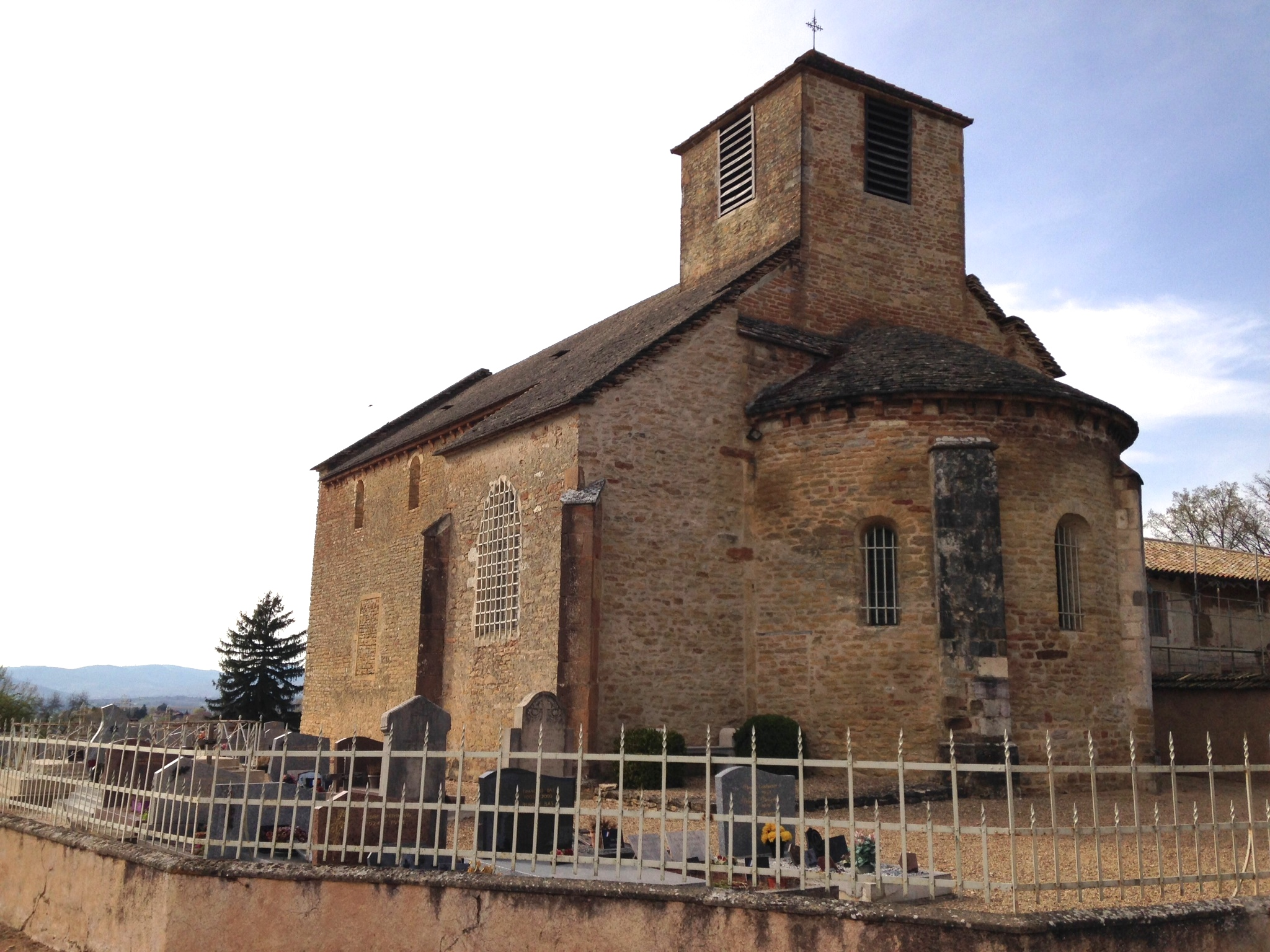 Église romane retable doré du village de Bey